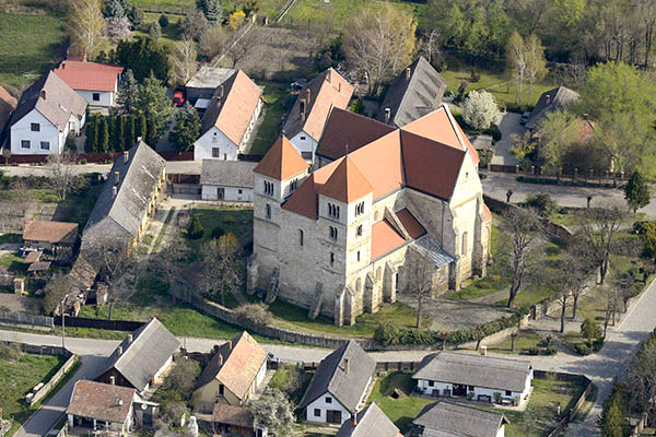 Légi fotó az ócsai premontrei kolostorról és tájházról